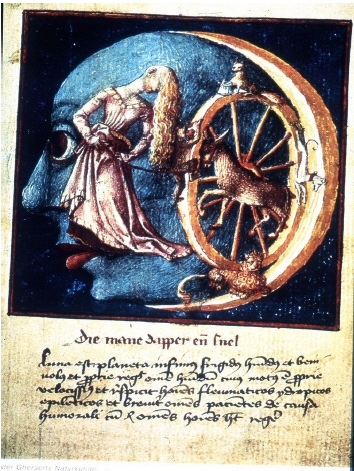 Miniatuur uit Natuurkunde van het Geheelal, vervaardigd door de Meester van Evert Zoudenbalch. Bijschrift bij miniatuur luidt: Die mane dapper ende snel. Naast de uitbeelding van de Maan is Fortuna weergegeven en de door een ezel aangedreven rota Fortunae met een vos, hond, leeuw en een aap erin. (Wolfenbüttel, Herzog August Bibliotheek, Cod. Guelf. 18.2. Aug. Qu, f. 123r.)